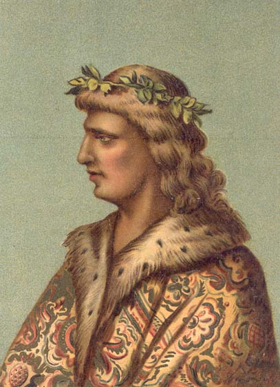 Állítólag egykorú miniature a londoni British-Museum Horatius Flaccus verseit, Juvenalis és Persius satiráit tartalmazó Corvin-codexében